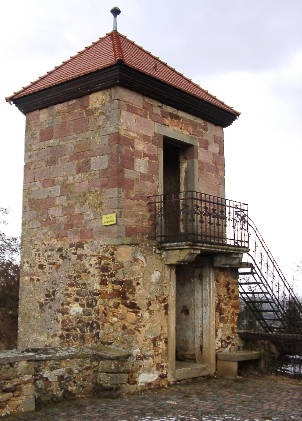 Turm auf der Burg Battenberg